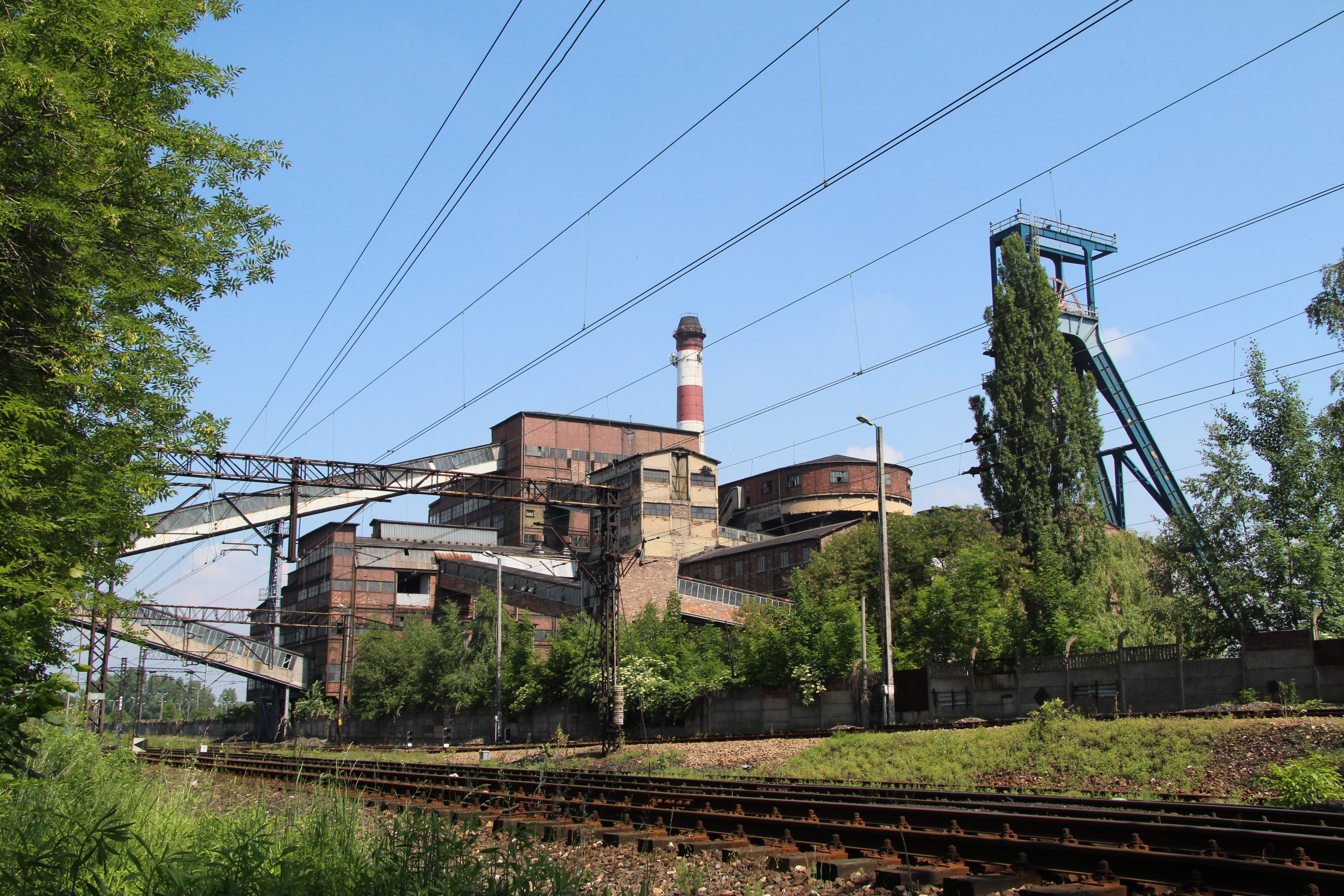 Kopalnia Mysłowice - widok od torów kolejowych